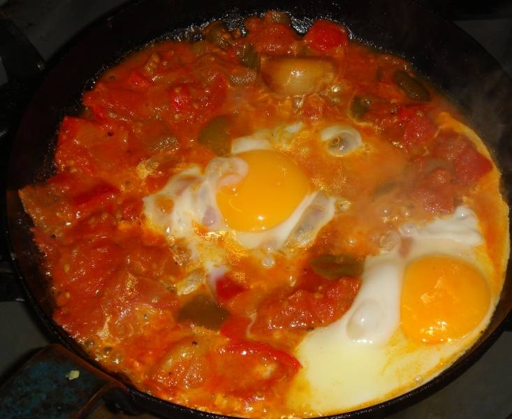 Shakshoka (peppers, tomatoes & eggs)